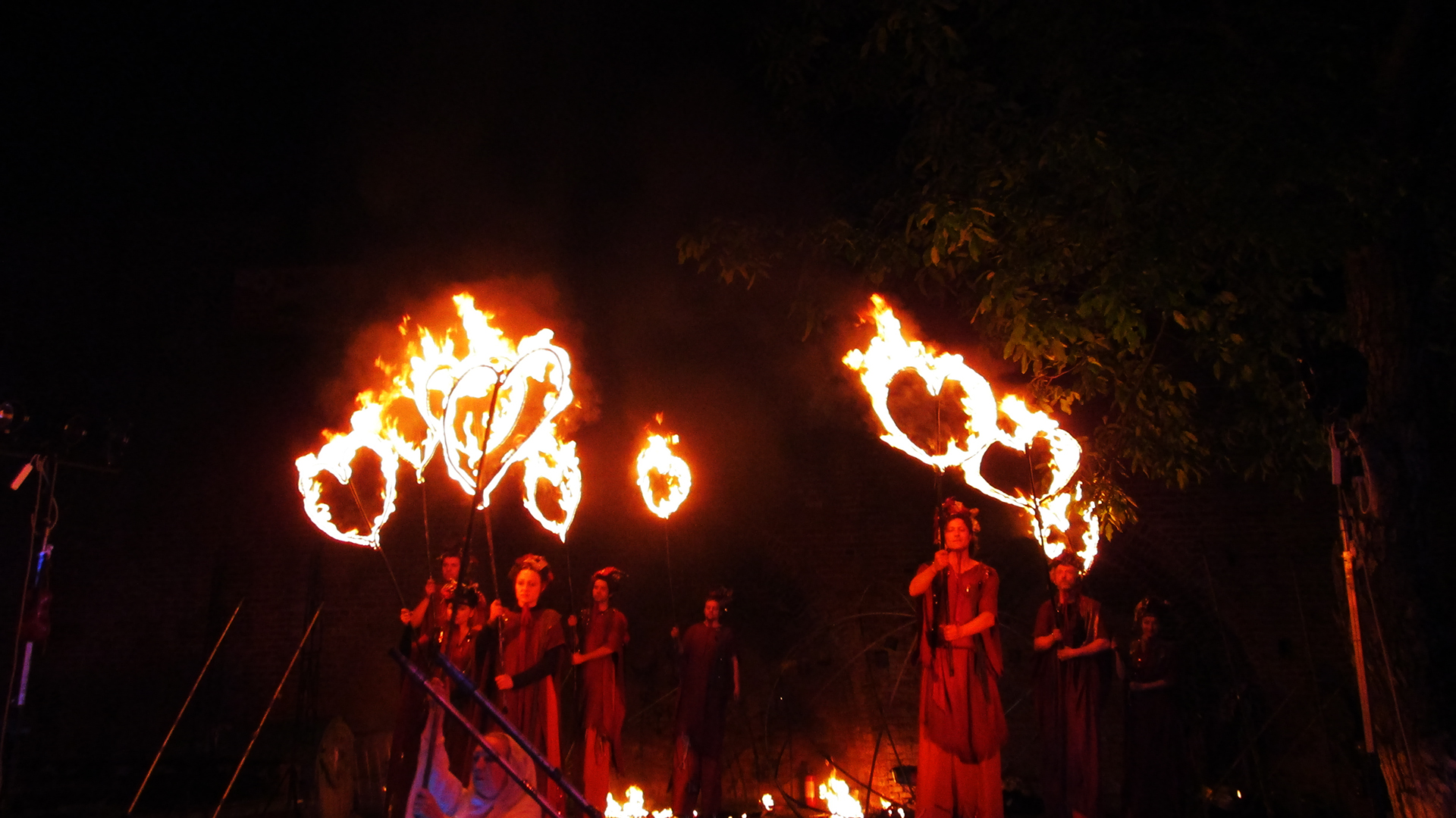 Театралізоване дійство на арт-фестивалі "Ніч у Луцькому замку - 2017"